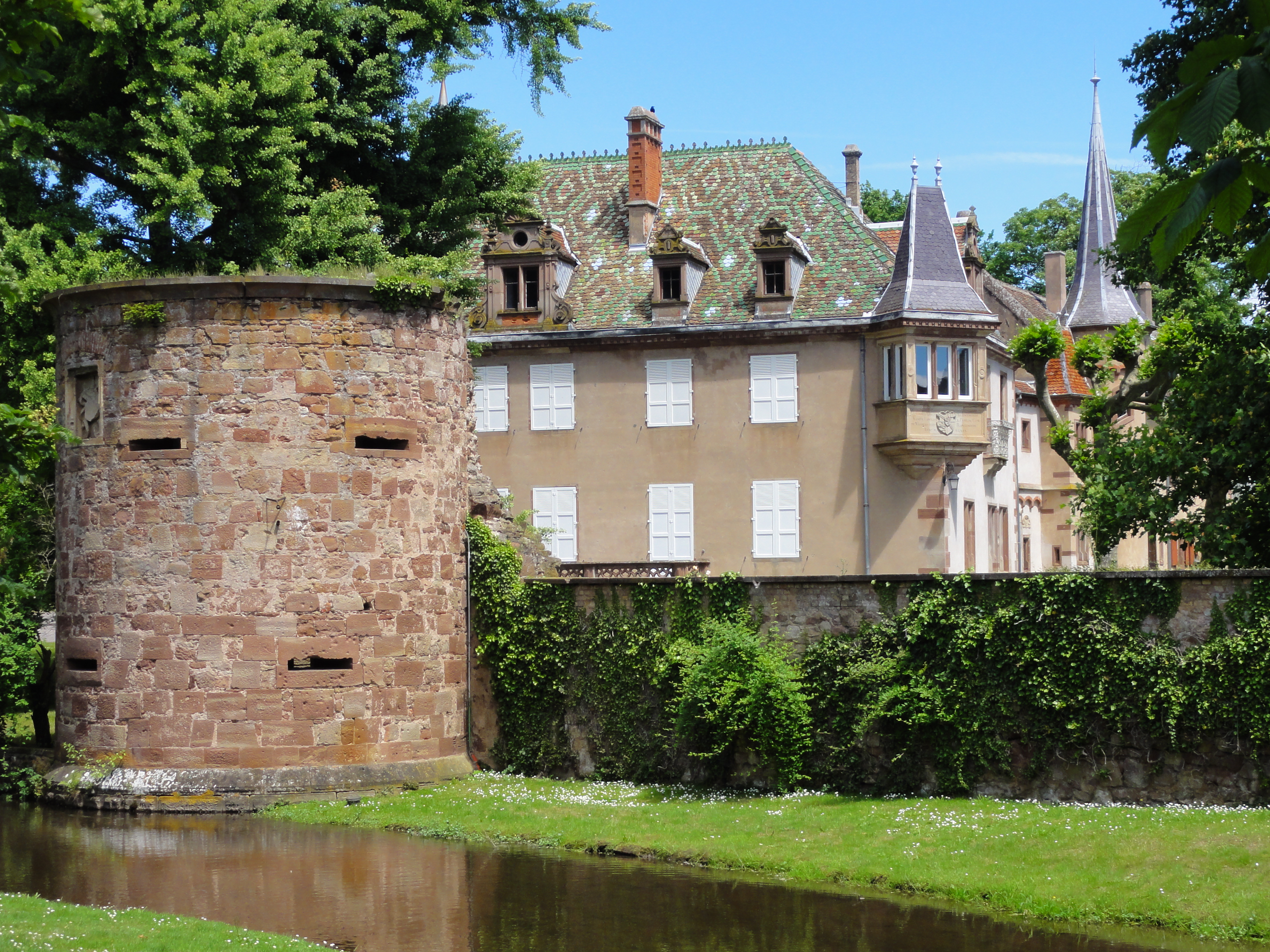 Alsace, Bas-Rhin, Dachstein, Ancien château épiscopal (XVIe-XIXe) dit "Château de Dachstein" (PA67000053, IA67011136). Remparts (XIVe-XVIIe) (PA00084669, IA67011134).